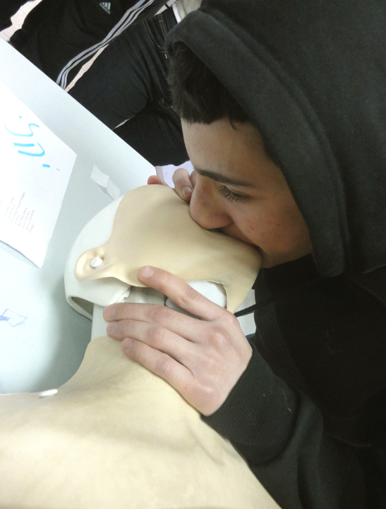 צילום: יובל אודסר